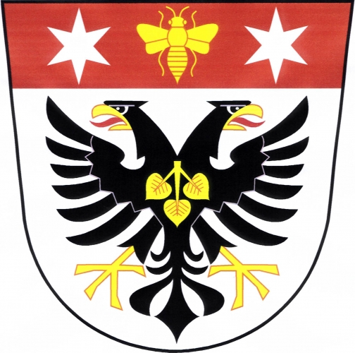 znak obce Bílovice